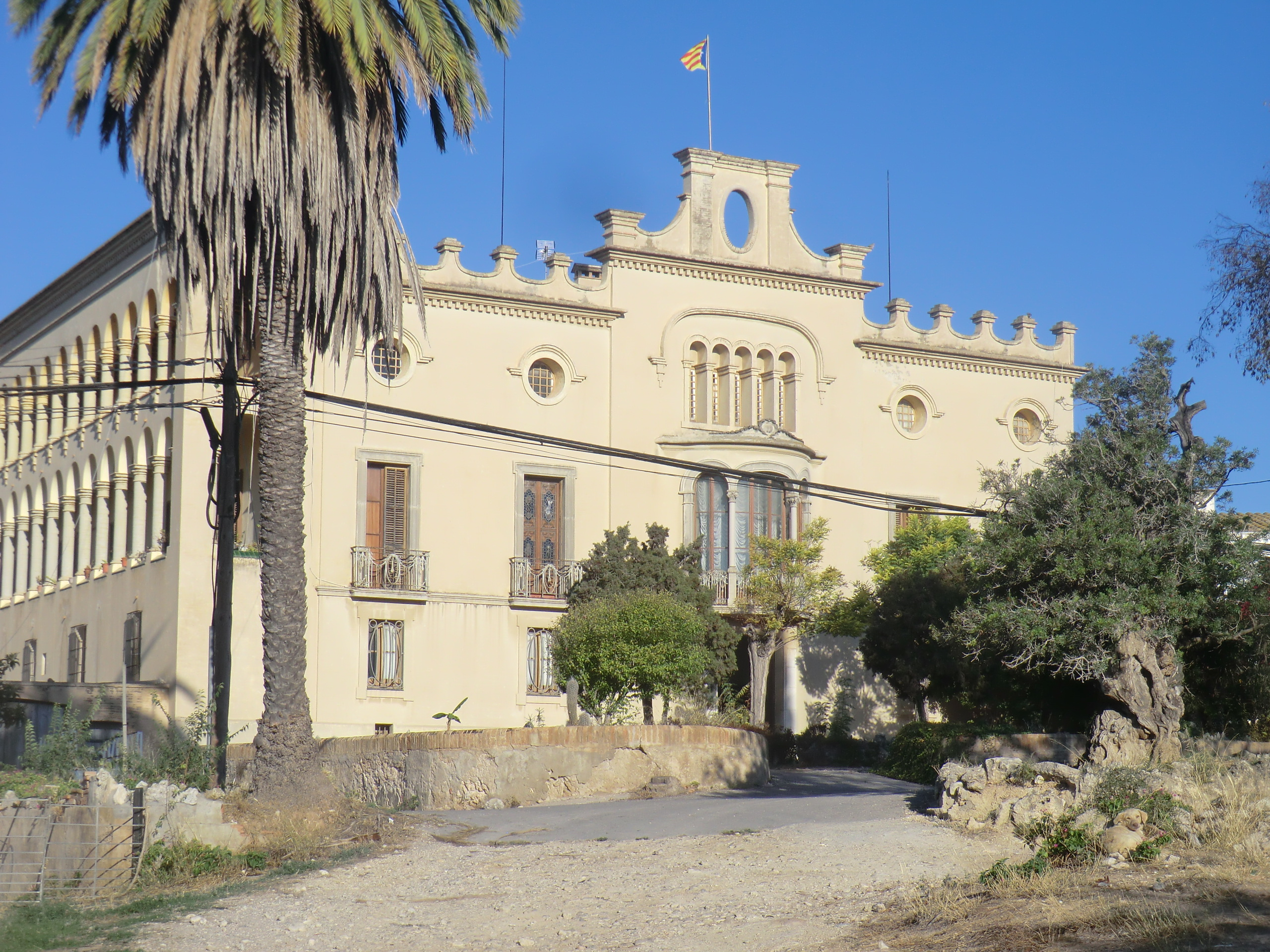 Can Coll (Sant Pere de Ribes)